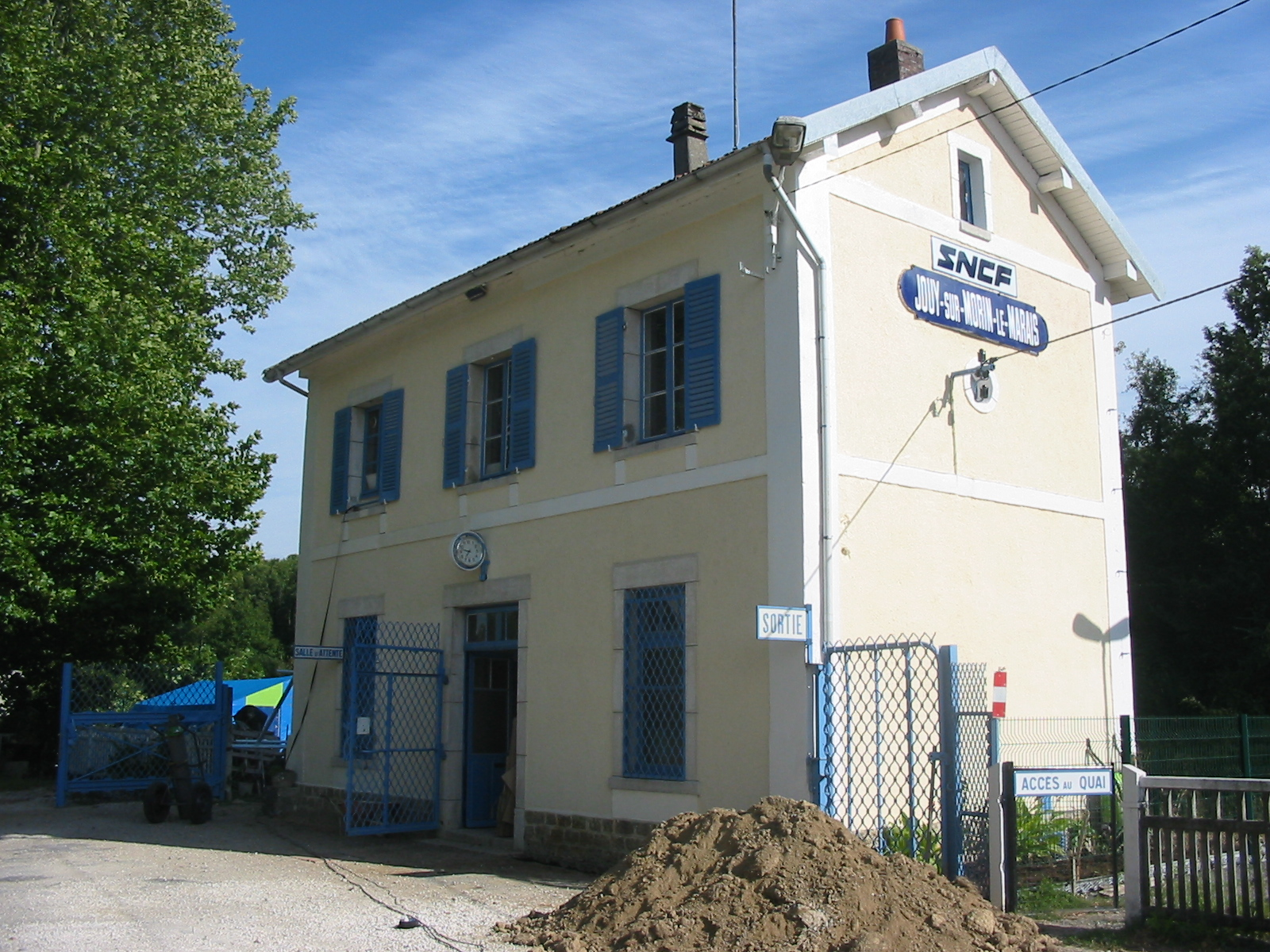 Gare ferrovaire de Jouy-sur-Morin ; prise en direction de l'Est.